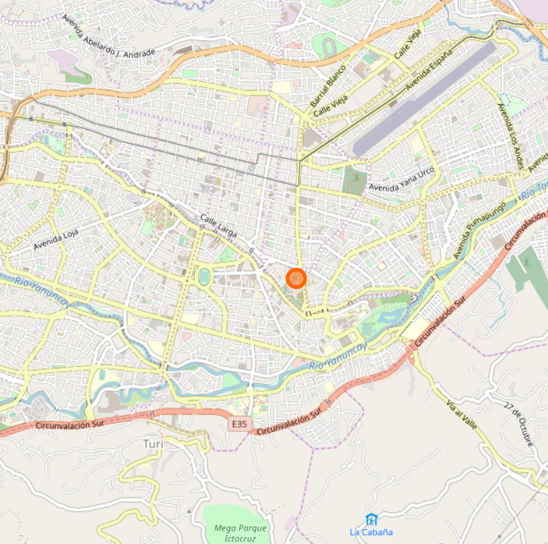 Este mapa de pumapungo se creó a partir de los datos del proyecto OpenStreetMap , recopilados por la comunidad. Este mapa puede estar incompleto y puede contener errores. No confíe únicamente en él para la navegación.